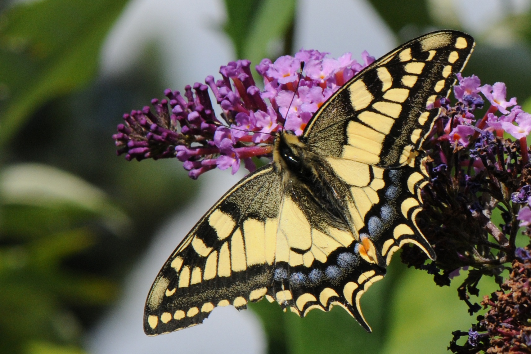 Papillio machaon